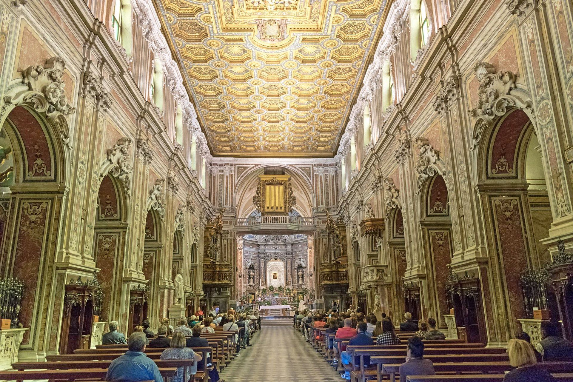 L'interno della Navata, Carmine Maggiore, Napoli